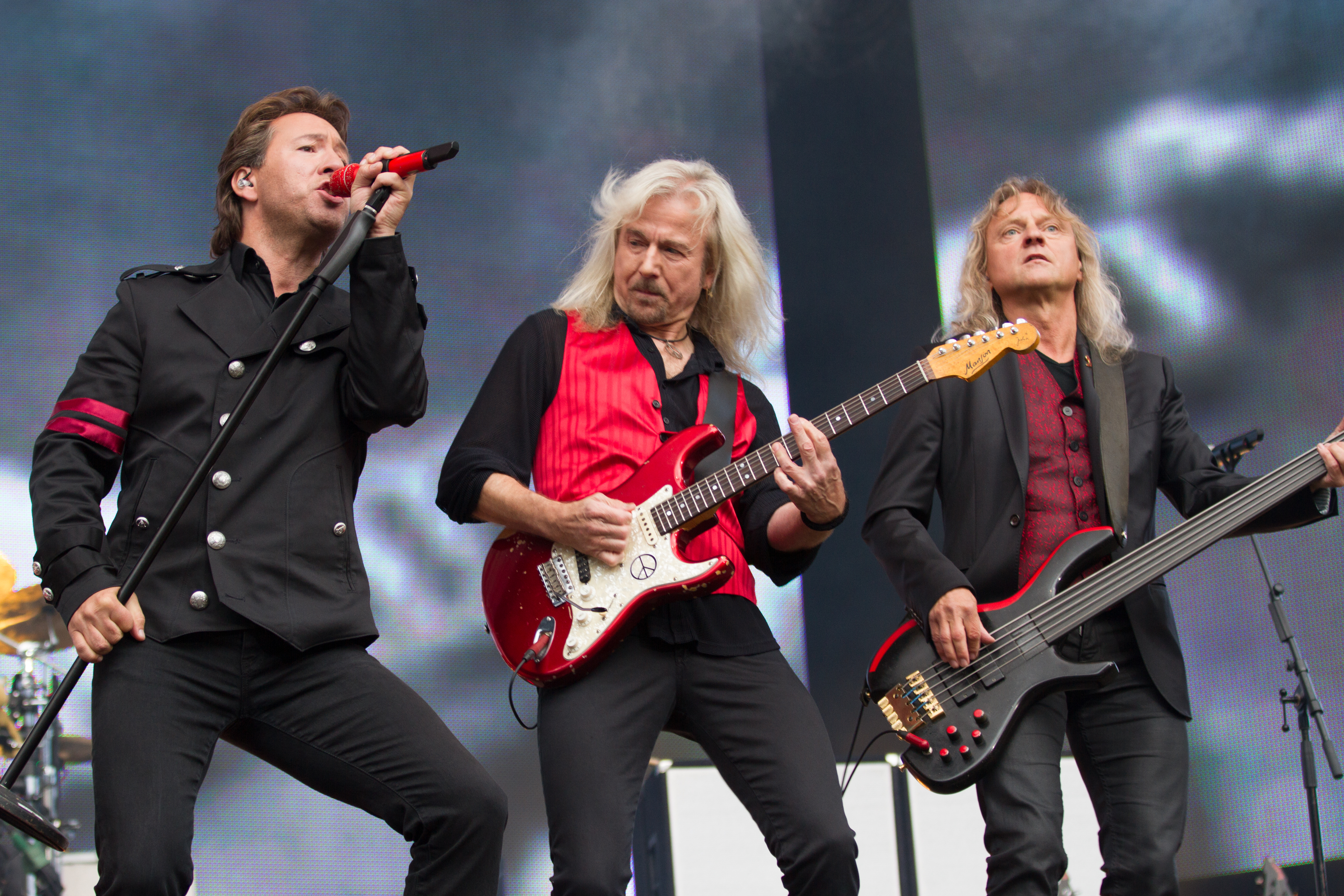 Claudius Dreilich, Bernd Römer und Christian Liebig von Karat beim "Karat 40 Jahre KARAT - Das EINZIGE Jubiläumskonzert" in der Berliner Waldbühne am 20.06.2015